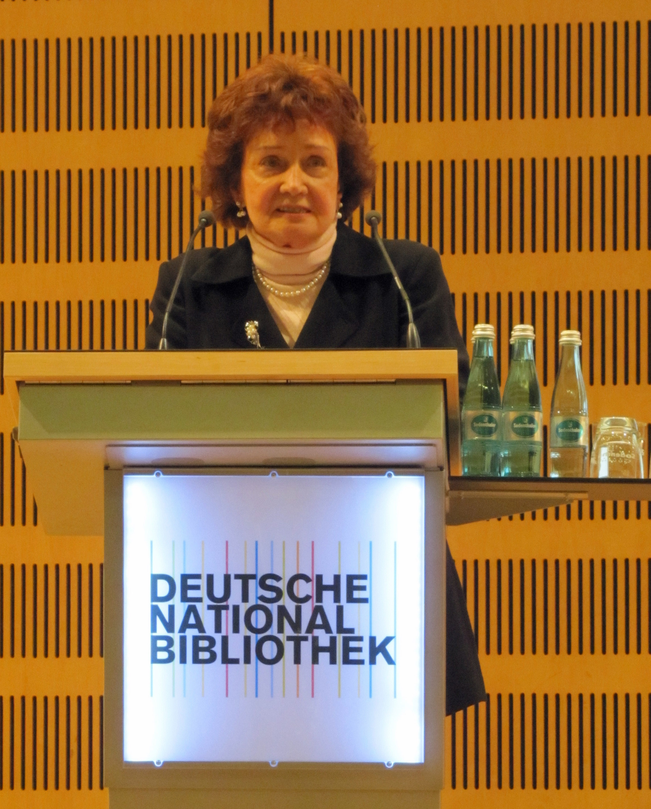 Katharina Mommsen, bei ihrer Gedenkrede zum 75. Geburtstag von Burgel Zeeh (1937-2009) in der Deutschen Nationalbibliothek (2012) in Frankfurt am Main.